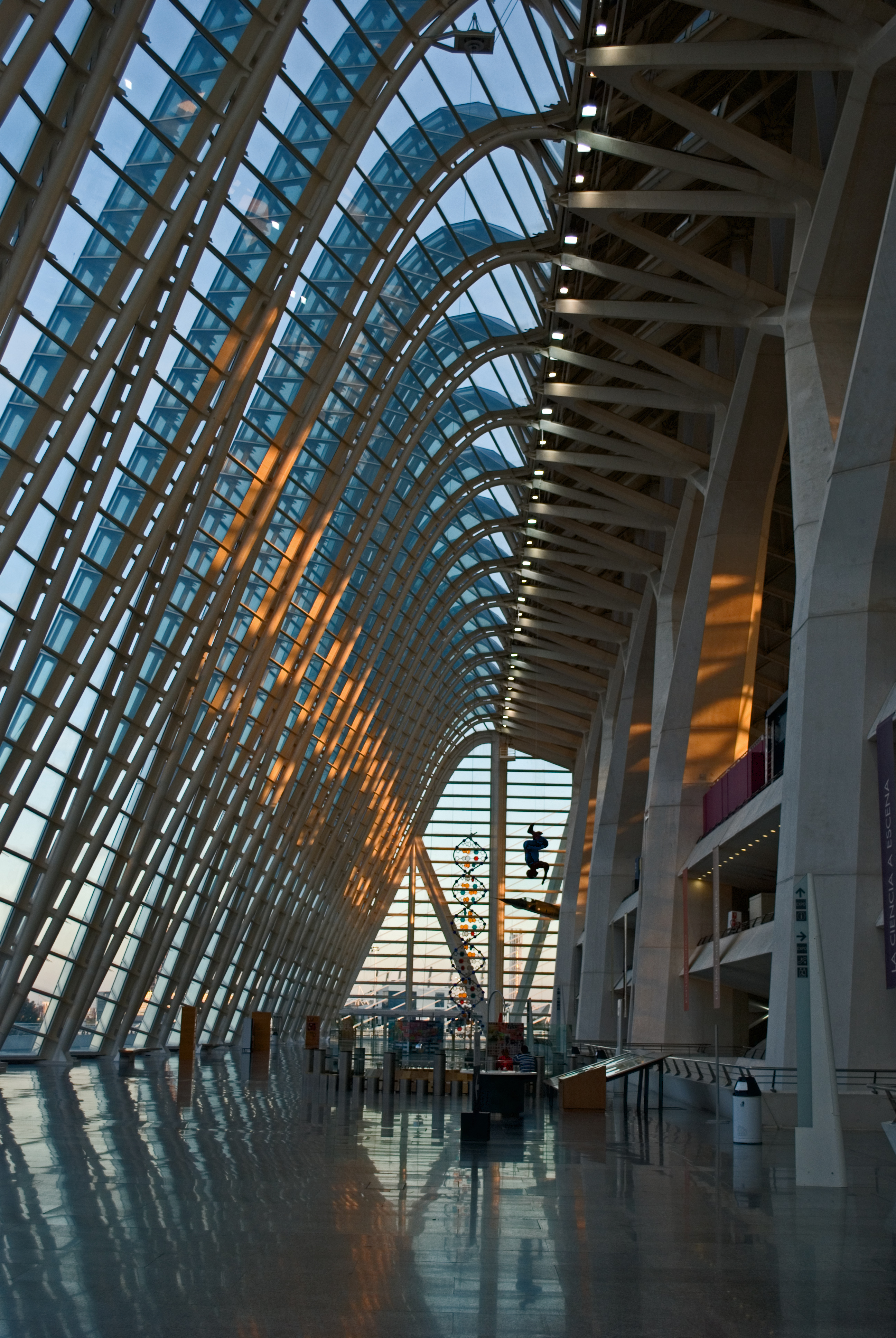 Interior del Museo de las Ciencias de Valencia, Príncipe Felipe (Ciutat de les Arts i les Ciències). Arquitecto: Santiago Calatrava